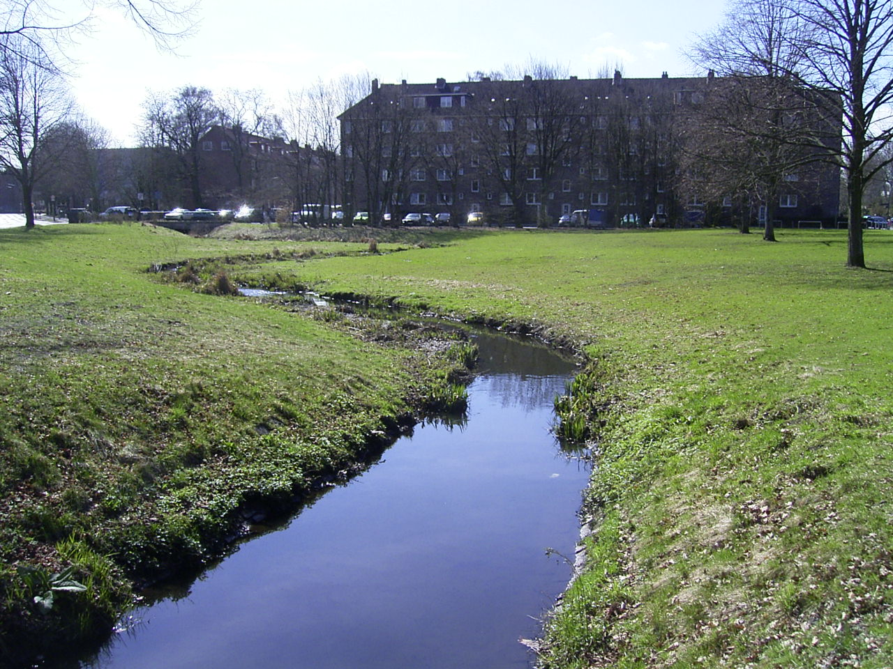 Renaturierte Aue der Seebek als Grenze zwischen Hamburg-Barmbek-Nord und Hamburg-Bramfeld